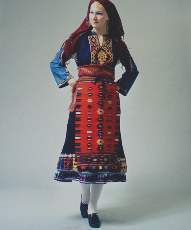 Τύπος της γυναικείας φορεσιάς από το Καβακλί της Β.Α. Θράκης, που φορέθηκε από τους πρόσφυγες της Ανατολικής Ρωμυλίας, σήμερα κομμάτι της Βουλγαρίας. Συλλογή Πελοποννησιακού Λαογραφικού Ιδρύματος, Ναύπλιο